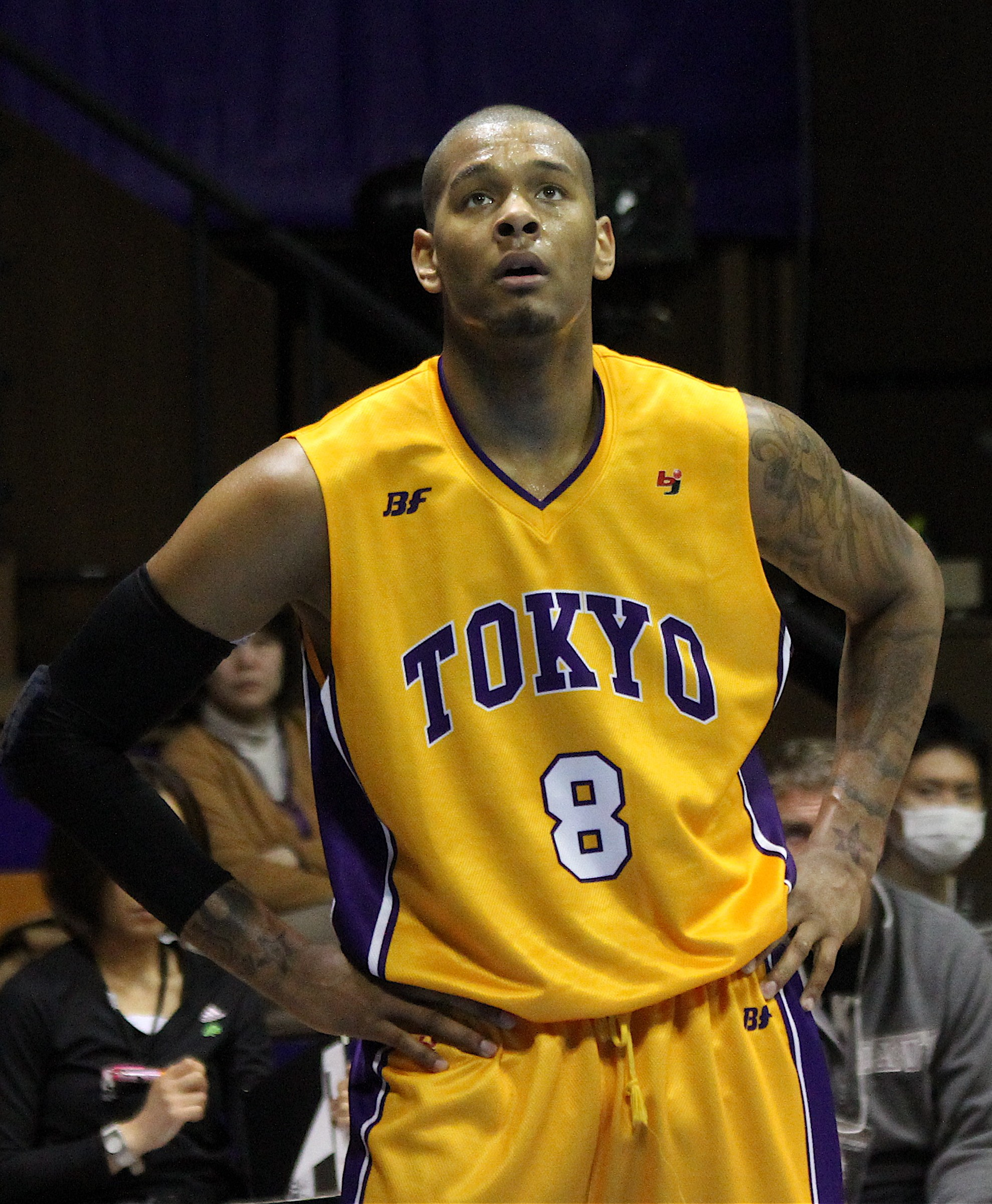 From Globalite Magazine